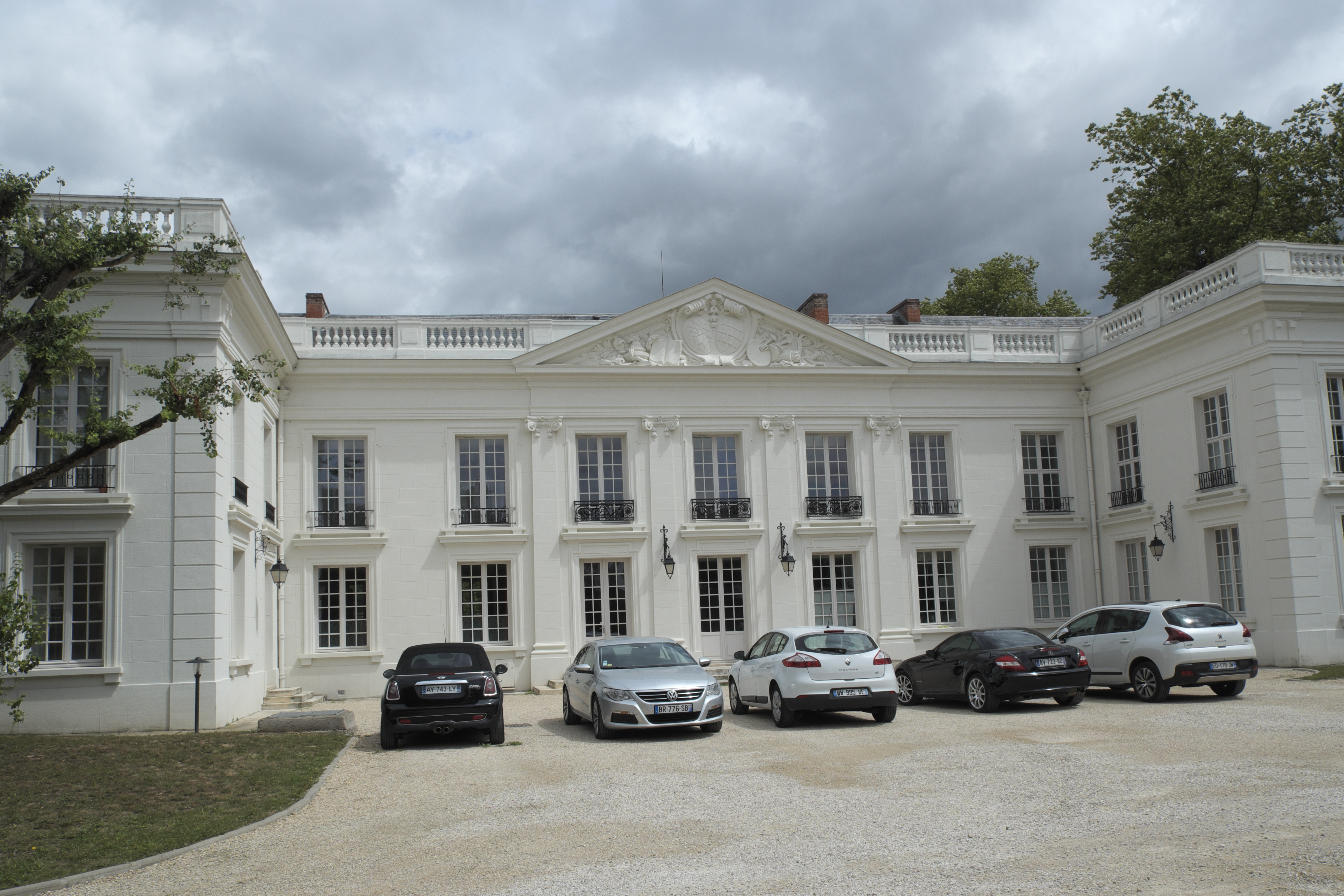 Château de Morigny in Morigny-Champigny im Département Essonne (Île-de-France/Frankreich)